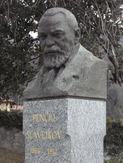 Busto di Pencio Slavejkov a Brunate